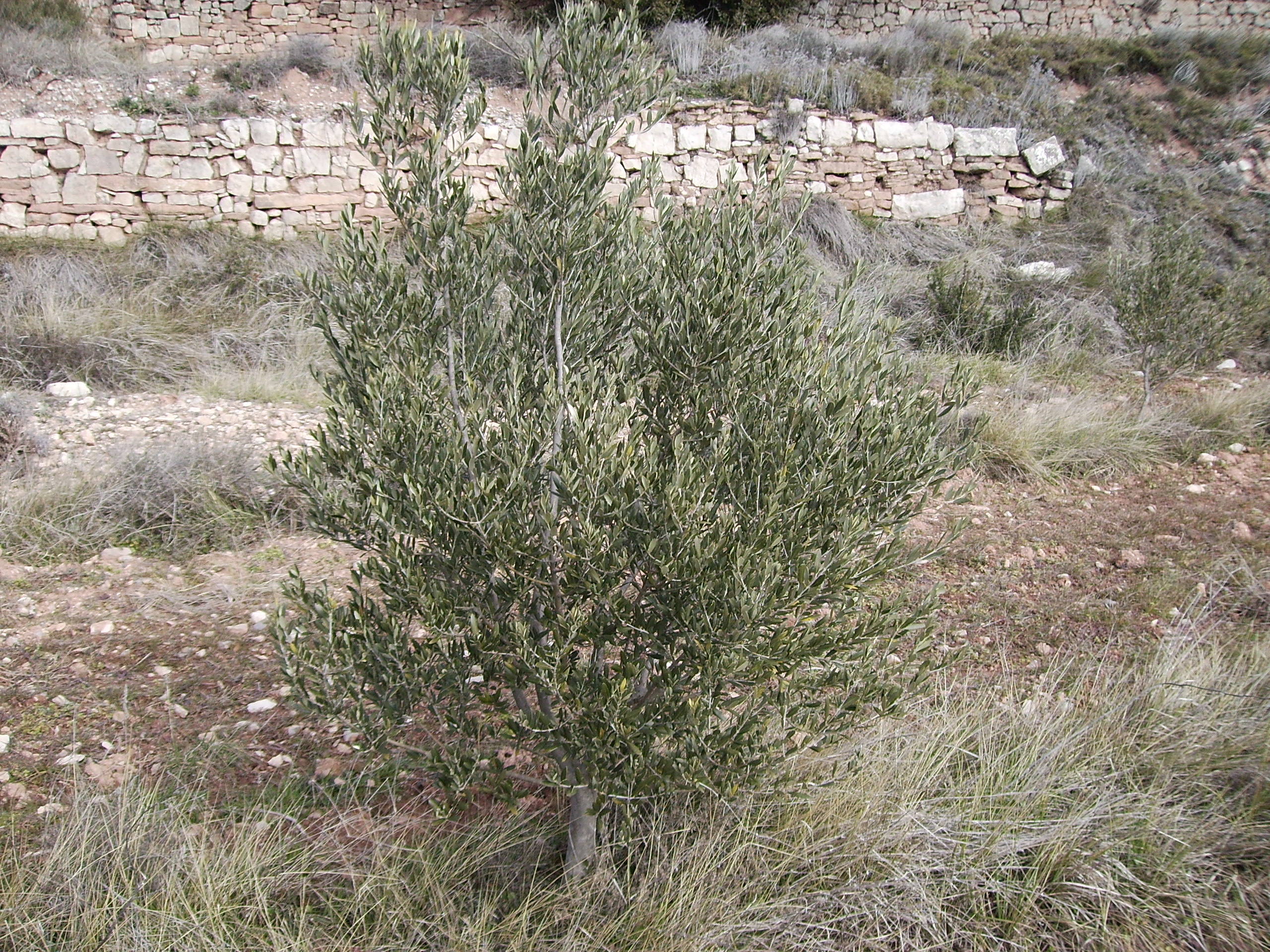 Olea europaea cvar. Arbequina a la Serra de Castelltallat.